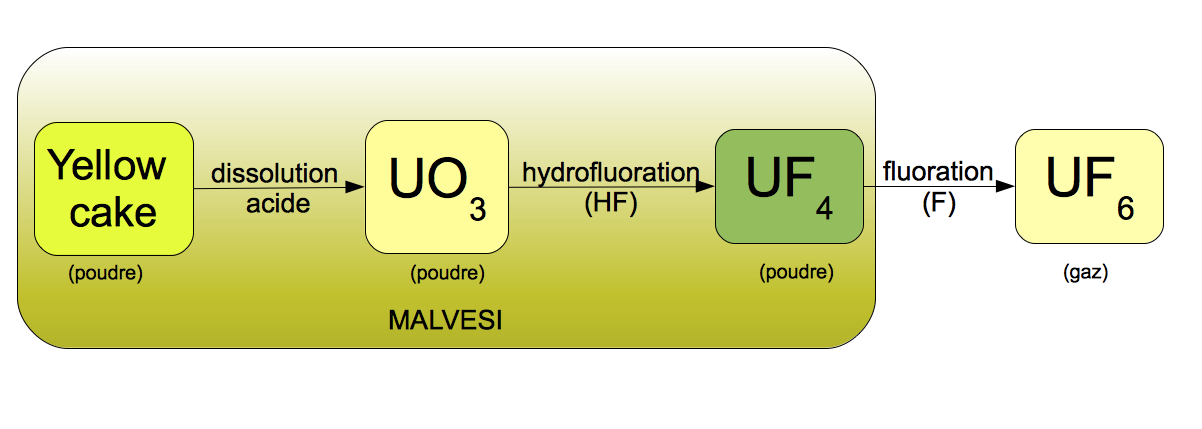 Le raffinage et la transformation chimique de l'uranium : le ‘yellowcake’ doit subir plusieurs transformations chimiques (dissolution acide et hydrofluoration) avant l’enrichissement de l'uranium puis la fabrication des assemblages combustibles qui sont utilisés dans les réacteurs nucléaires.